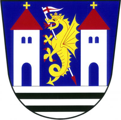 Bořitov znak